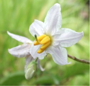 Horsenettle bloom Image taken by me, released under GFDL Pollinator 09:27, 24 Feb 2004 (UTC)